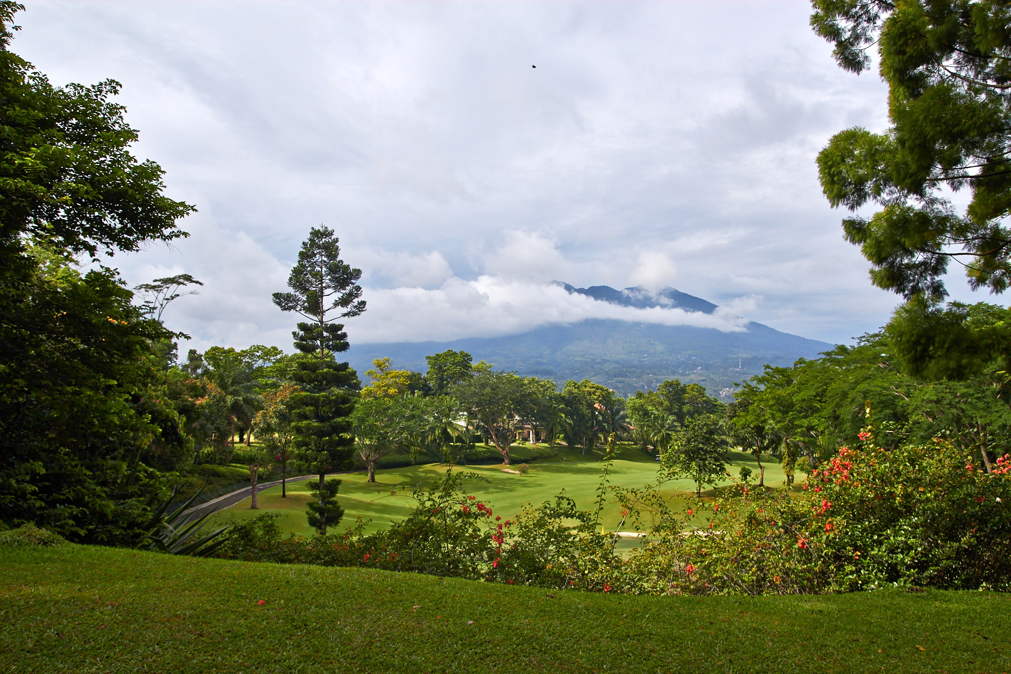 Pemandangan di sekitar padang golf Rancamaya